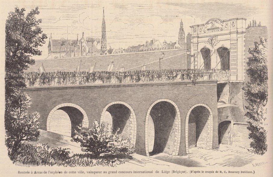 Rentrée chez lui de l'Orphéon d'Arras vainqueur du concours international d'orphéons de Liège.